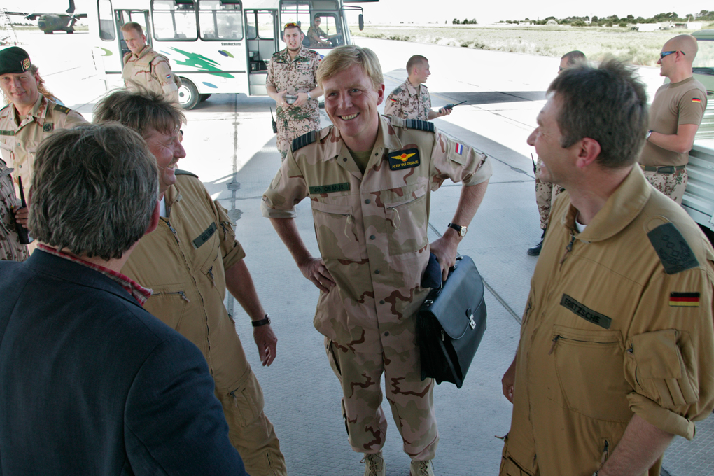 De eerste Koningsdag wordt zaterdag 26 april gevierd. Hoewel Koning Willem-Alexander met het aanvaarden van de troon afstand deed van zijn militaire status, blijft de hechte band tussen het Koningshuis en de krijgsmacht bestaan.